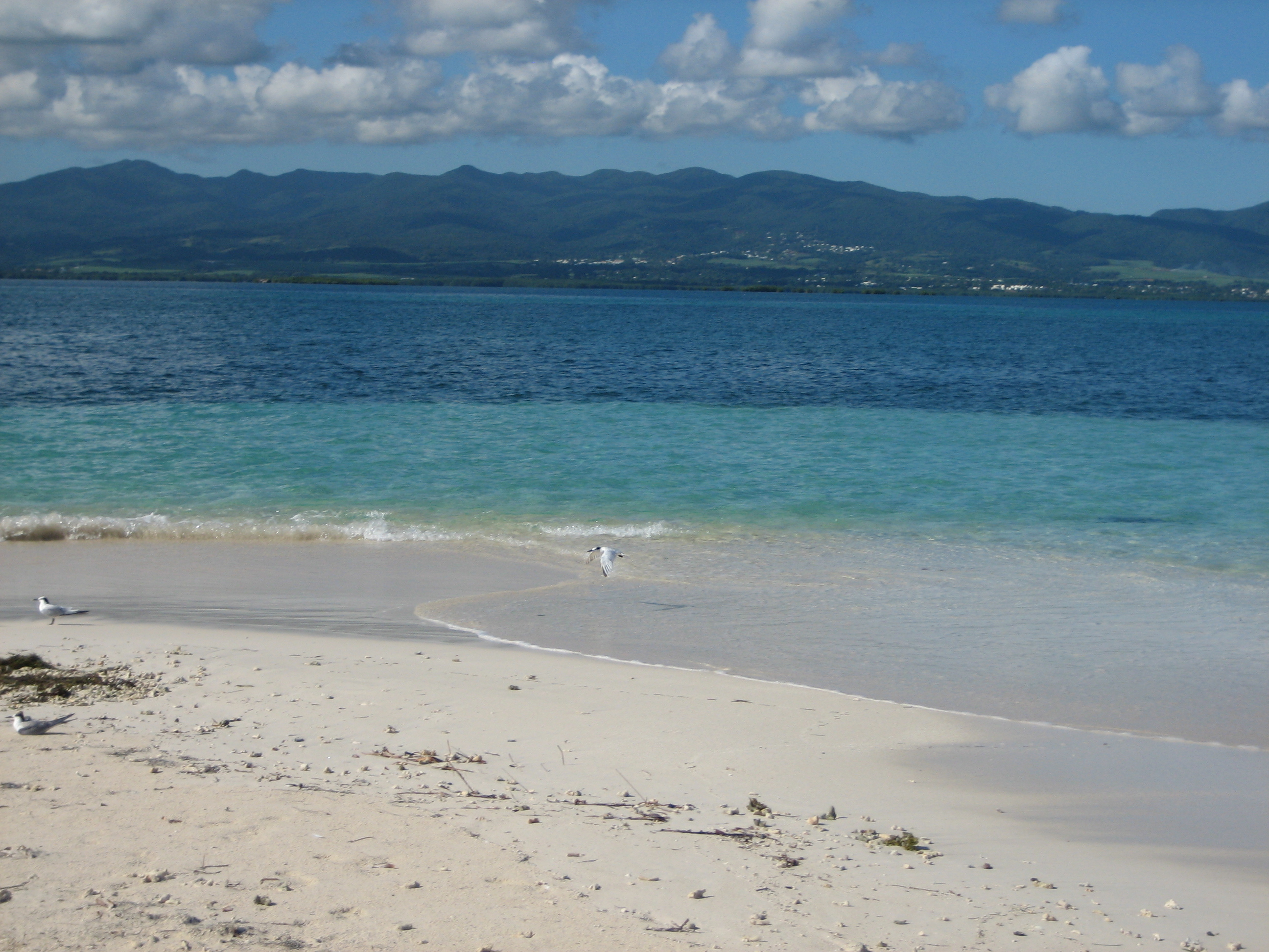 L'île de Basse-Terre vue depuis l'ilet Caret (Sainte-Rose, Guadeloupe, France).